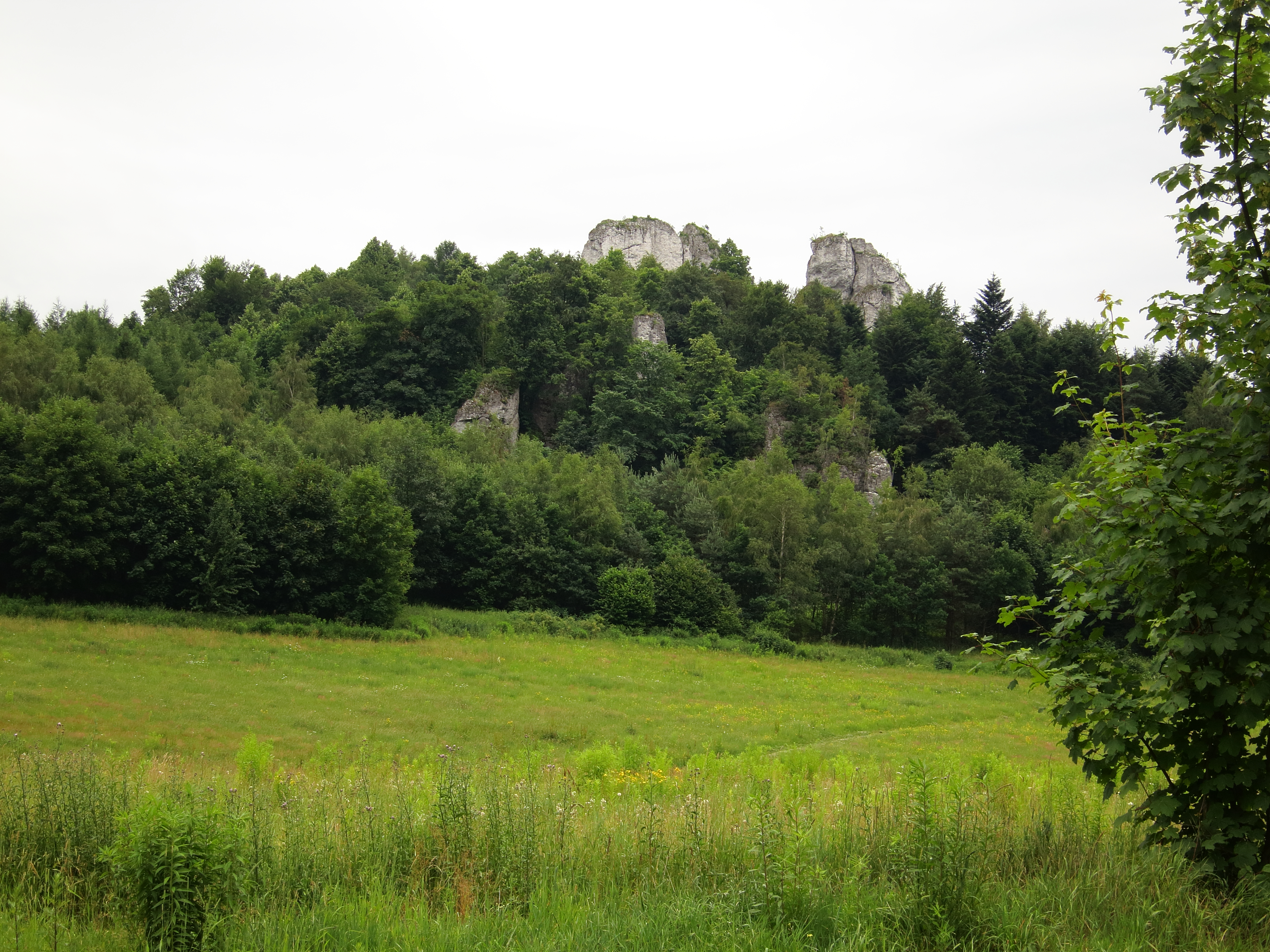 Park krajobrazowy: Park Krajobrazowy Orlich Gniazd This is a photography of protected area with CRFOP ID PL.ZIPOP.1393.PK.6